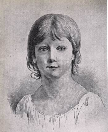 Auteursrecht is verlopen; gemaakt tussen 1800 - 1806